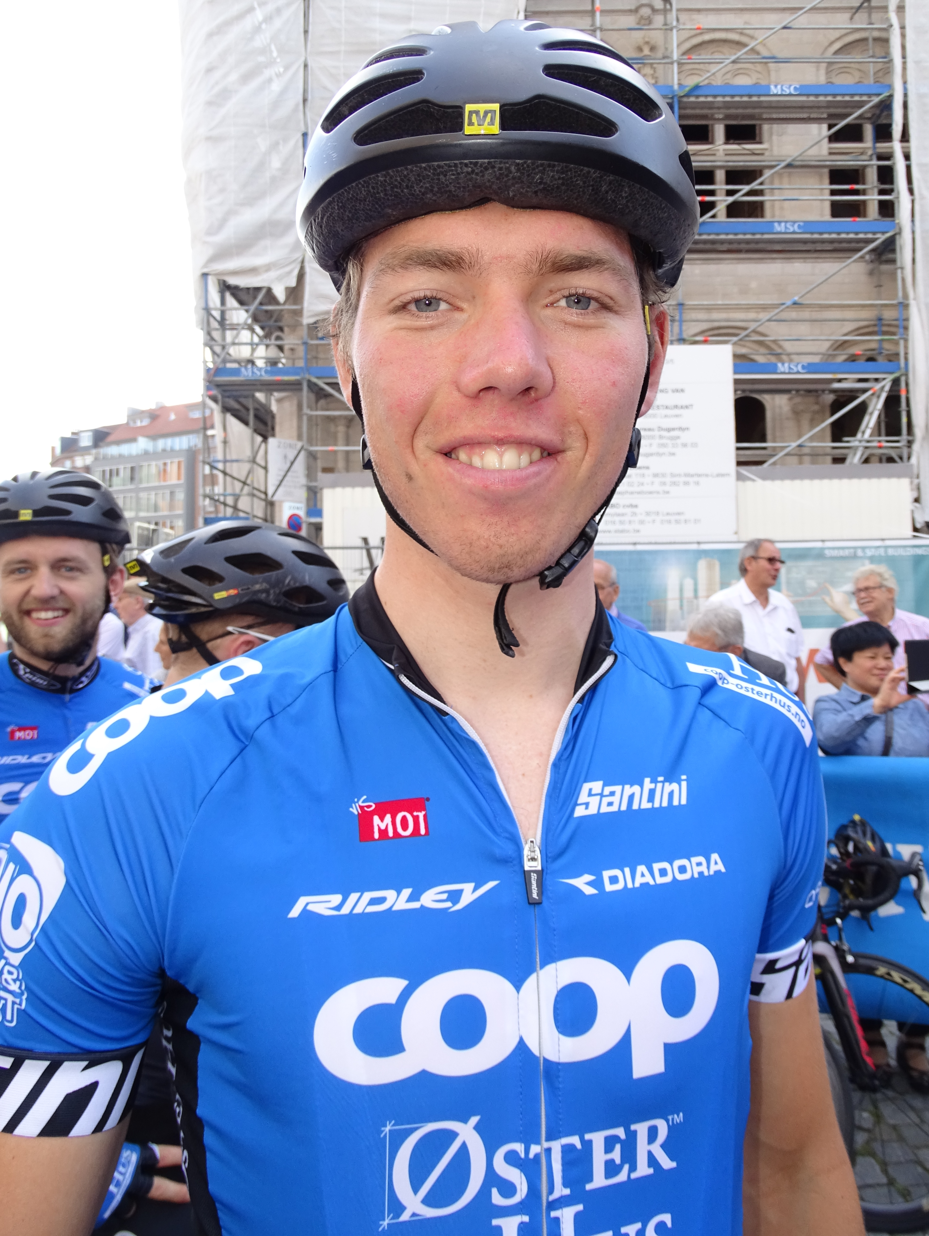 Reportage réalisé le dimanche 23 août à l'occasion du départ et de l'arrivée du Grand Prix Jef Scherens 2015 à Louvain, Belgique.